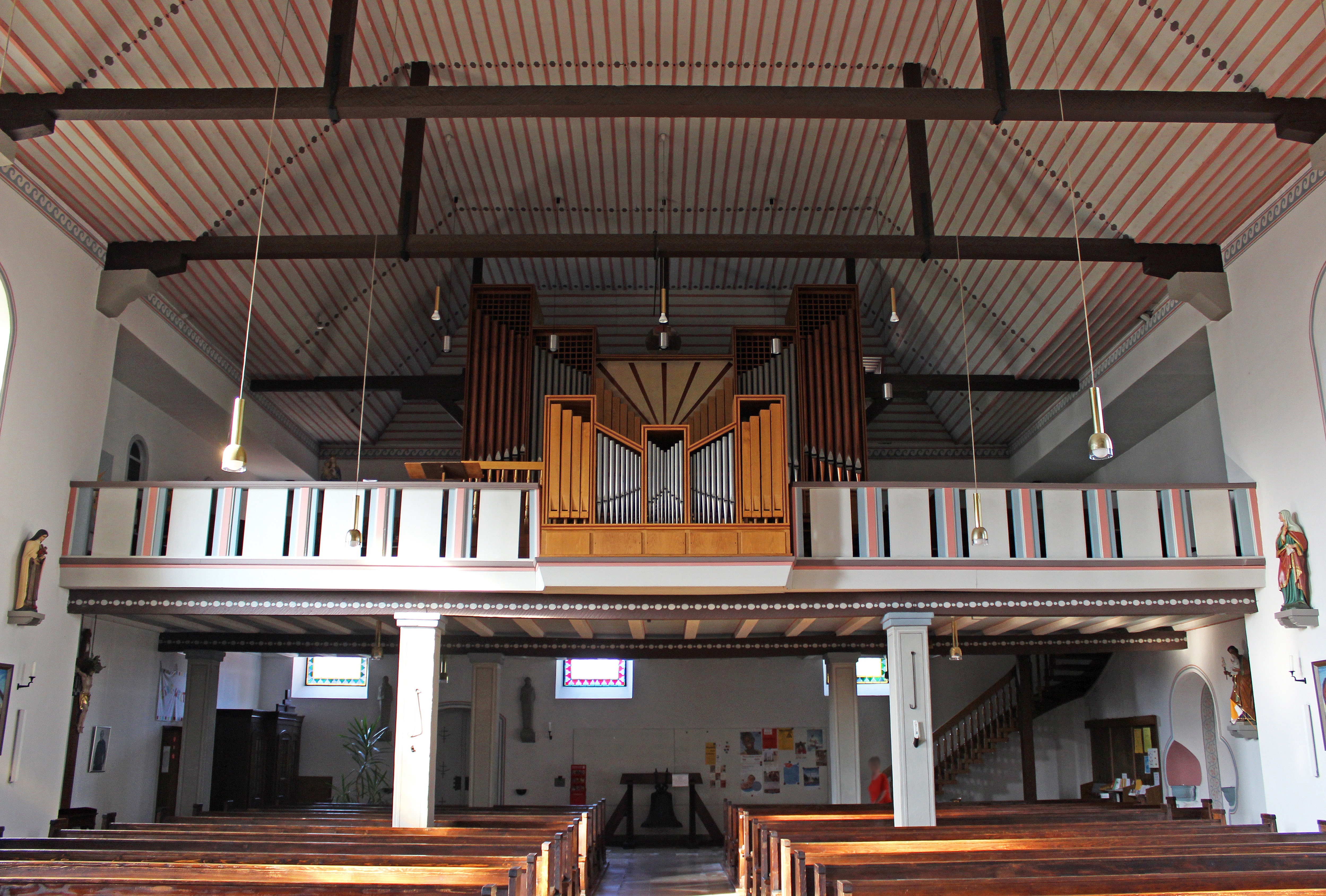 Blick ins Innere der katholischen Pfarrkirche St. Barbara in Blickweiler, einem Stadtteil von Blieskastel, Saarpfalz-Kreis, Saarland